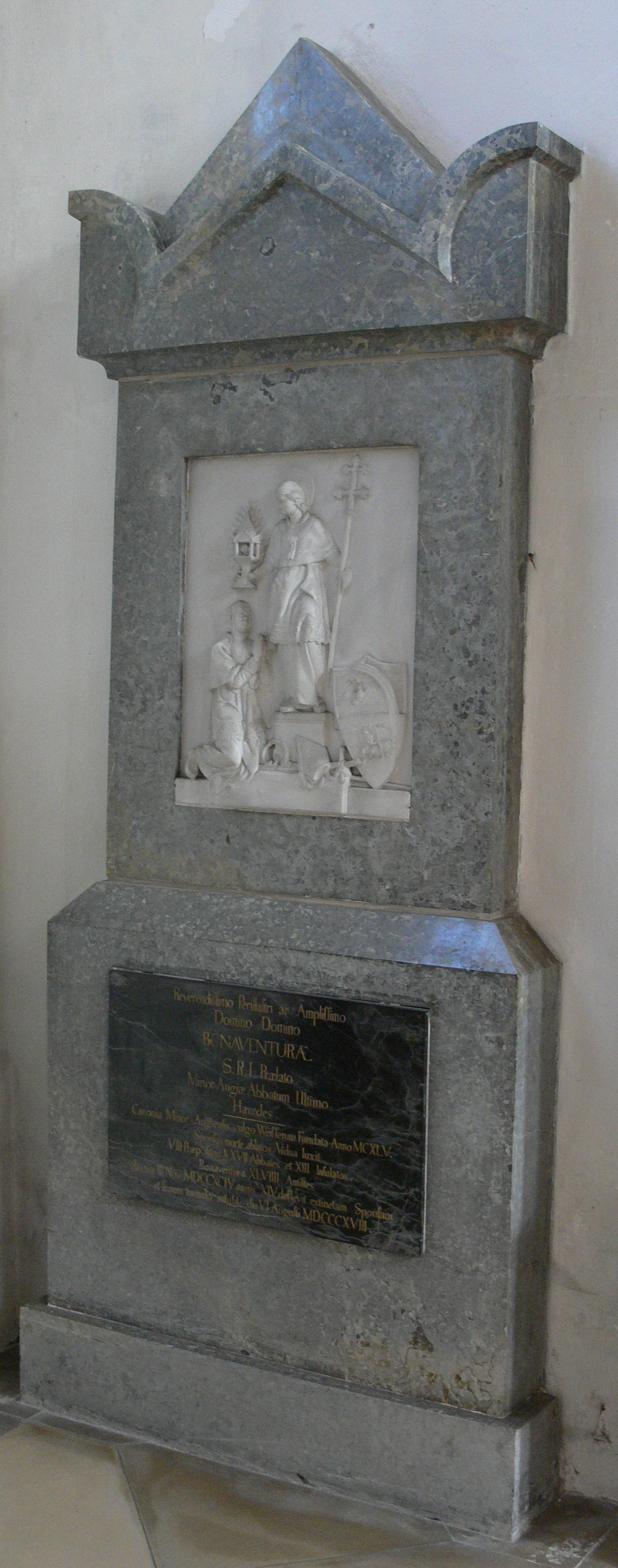 Ravensburg, ehem. Klosterkirche Weißenau, Gedenkstein für Abt Bonaventura Brem